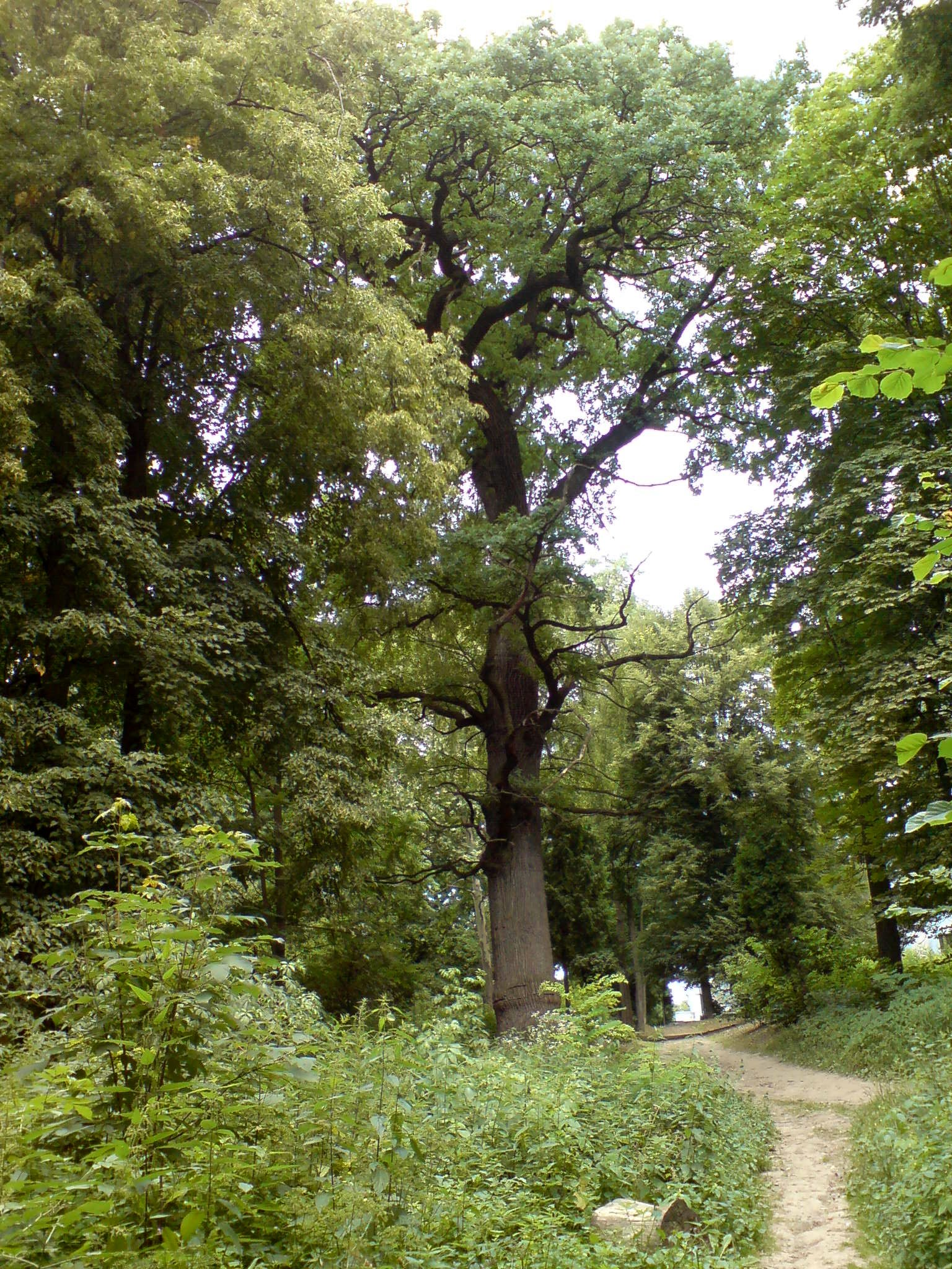 Kiev. An old oak in Golosiivsky forest.